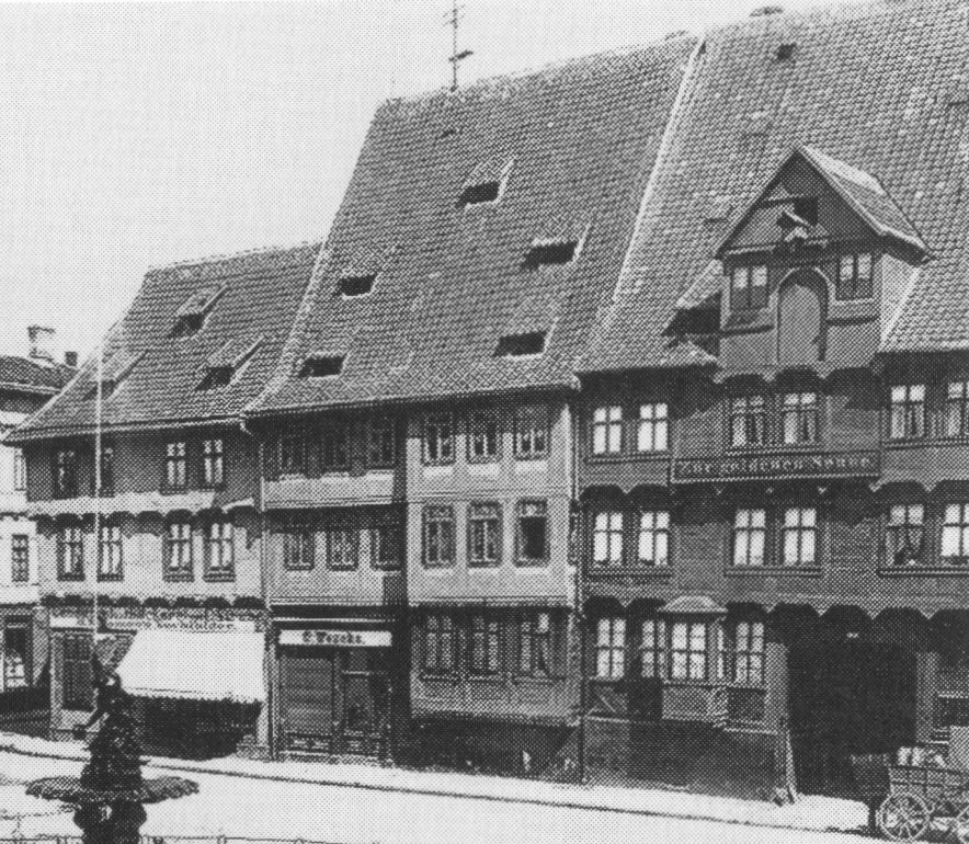 Steinweg 9-11, Quedlinburg um 1900, Ausschnitt aus einer Fotografie